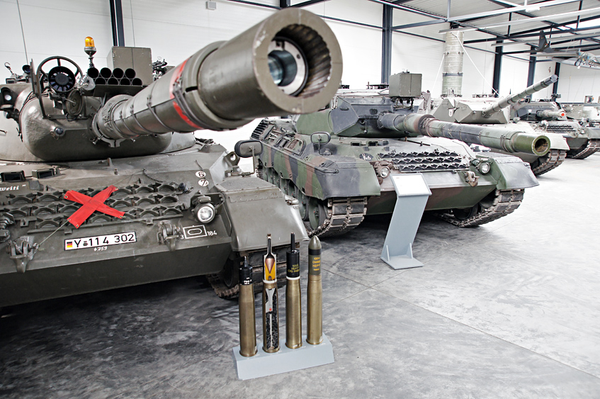 Ein Blick in einen Teil der Halle 2. (Thematischer Bereich "Kampfpanzer Bundeswehr")